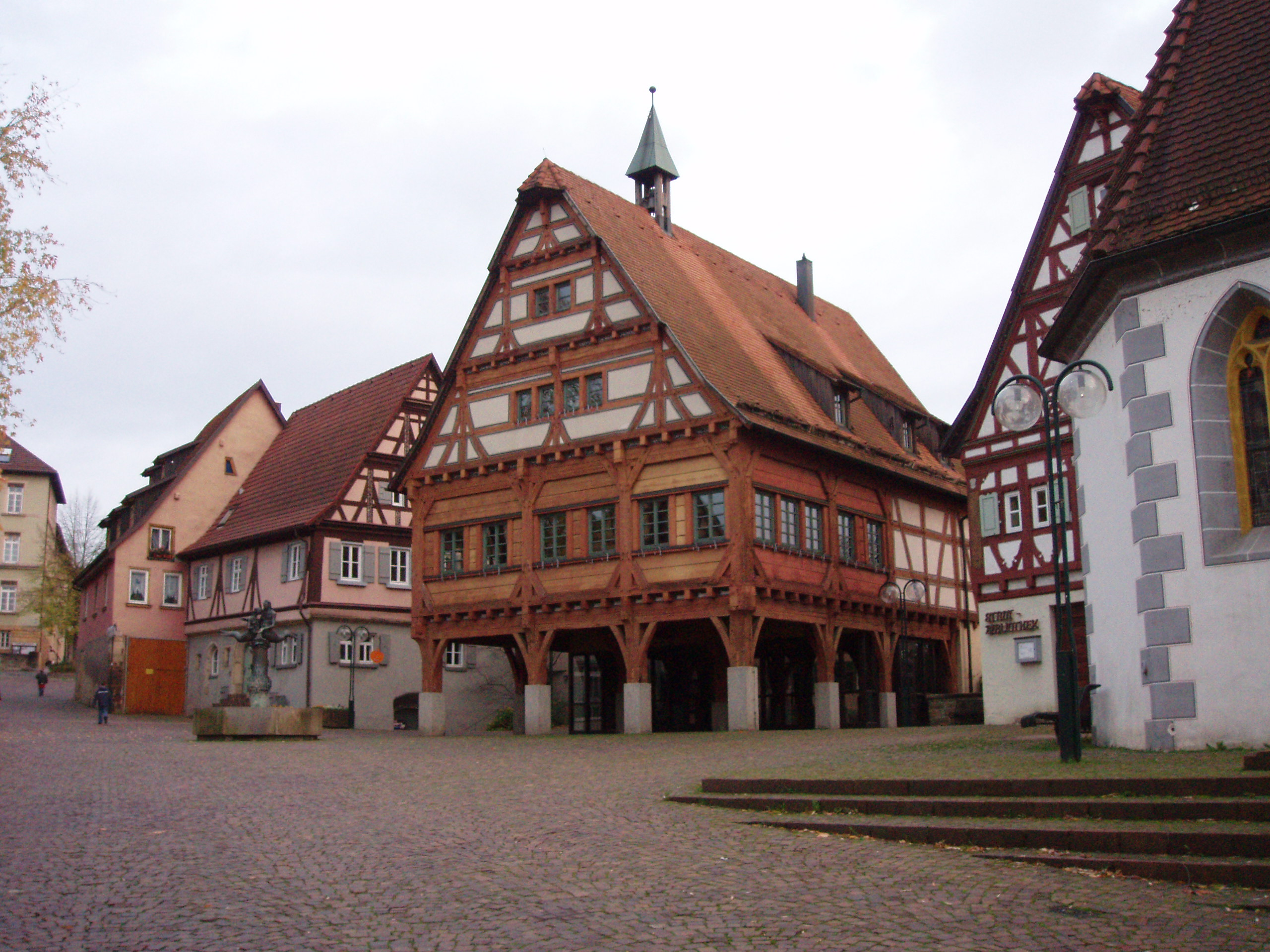 Altes Rathaus Plochingen